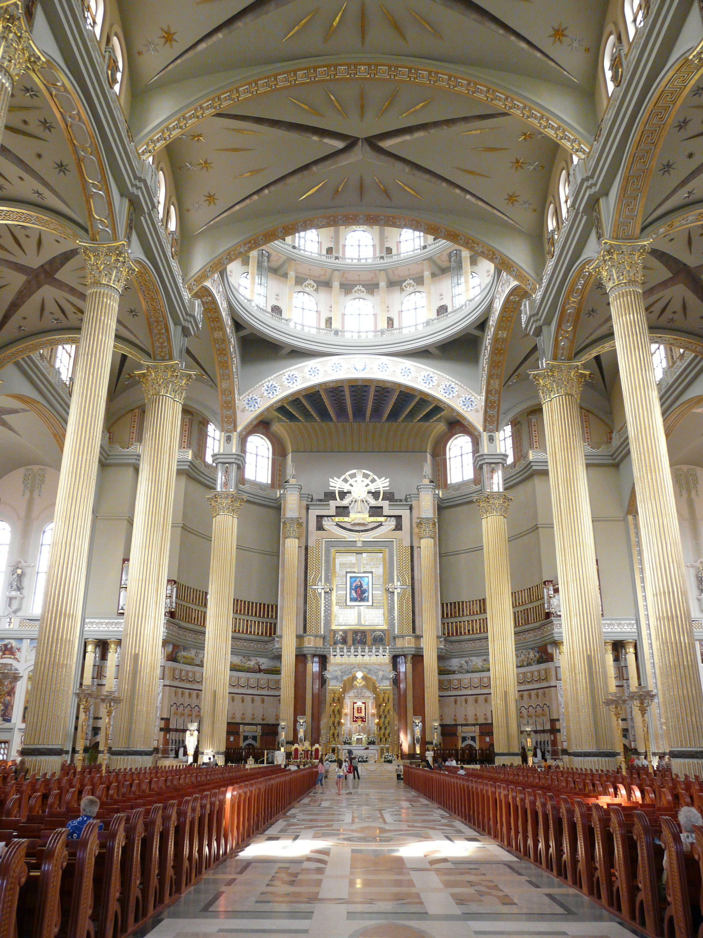 Licheń